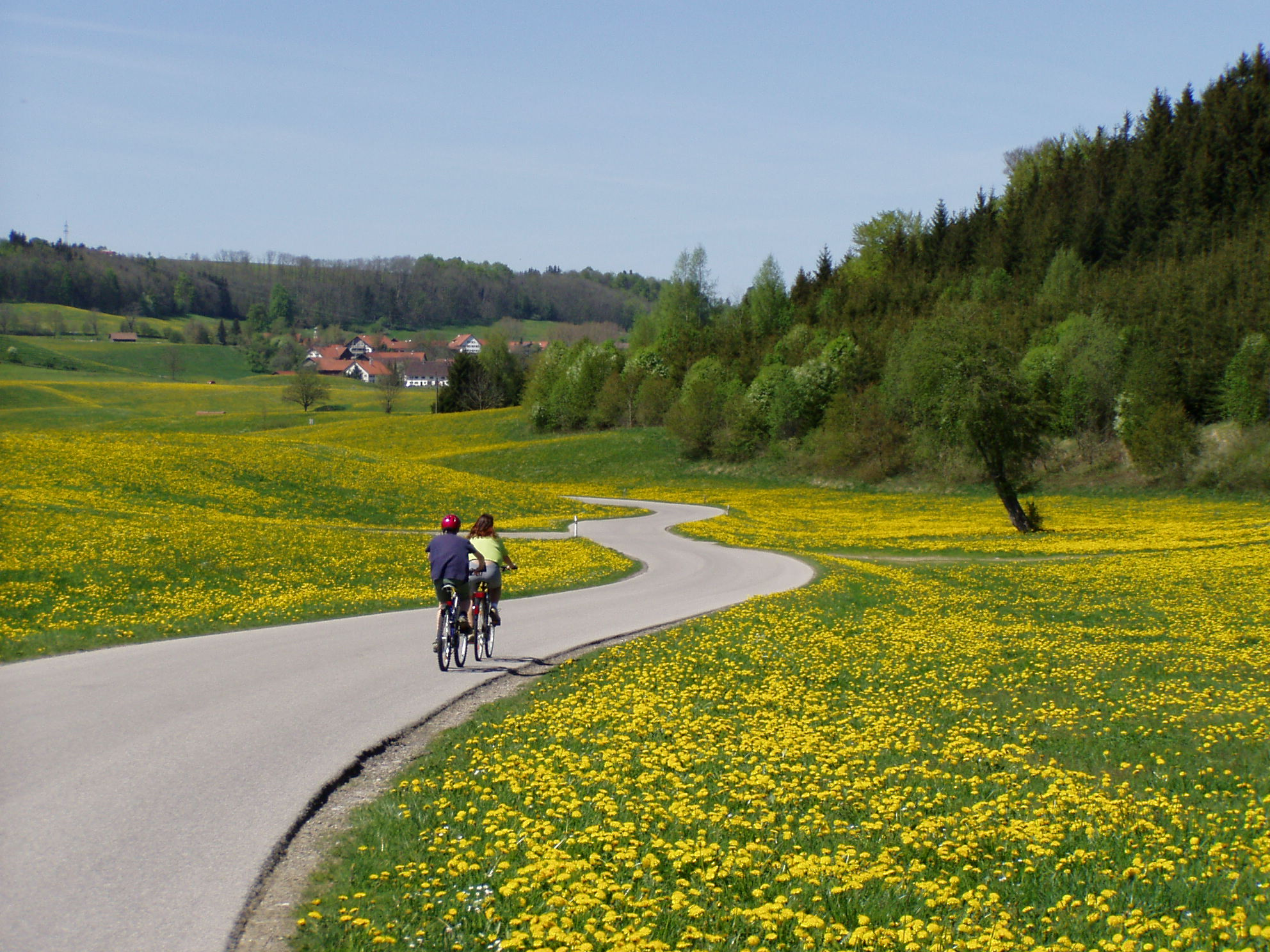 Zwischen Sellthüren und Immenthal, Günzach